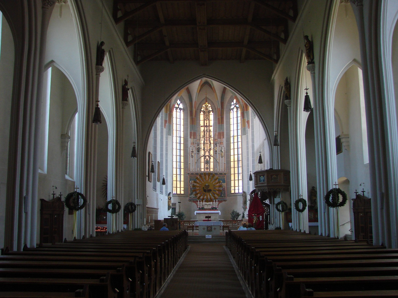 Nördlingen, Germany, Salvator church, nave